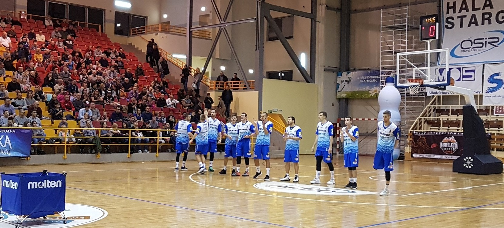 Pogoń Prudnik